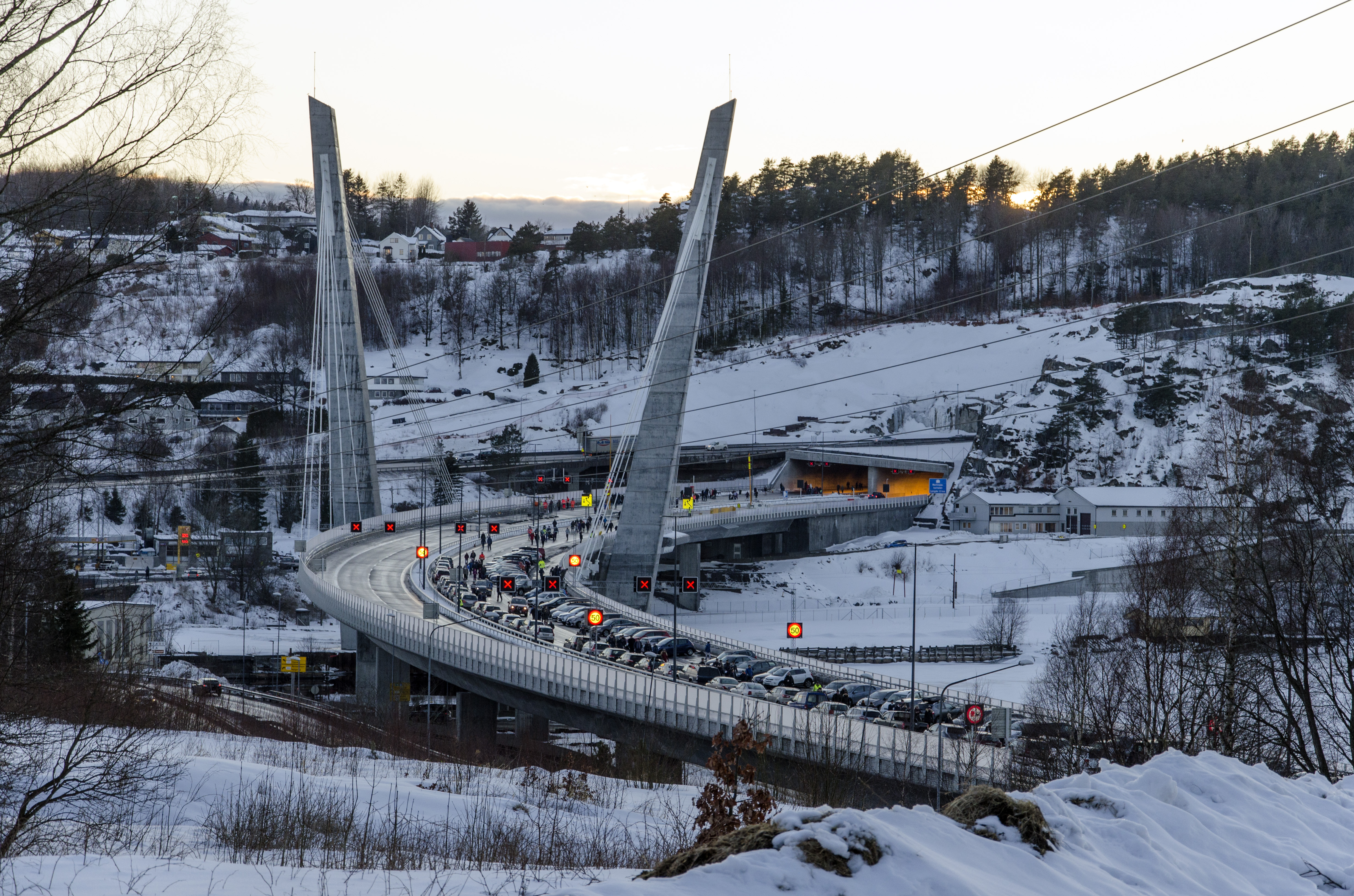 Farrisbrua, E18, Larvik, Norge